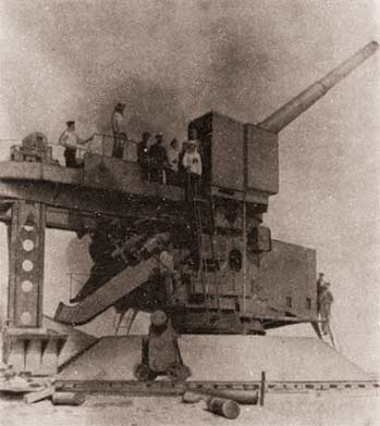 305/52 орудие на открытой позиции, батарея №43, мыс Церель, 1916-1917 гг.